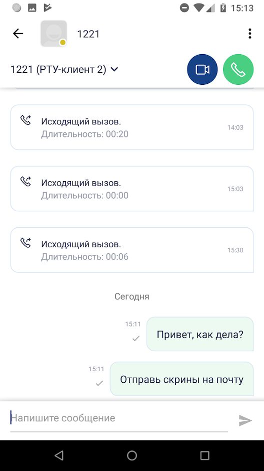 Скриншот приложения РТУ-клиент на устройстве под управлением ОС Android.